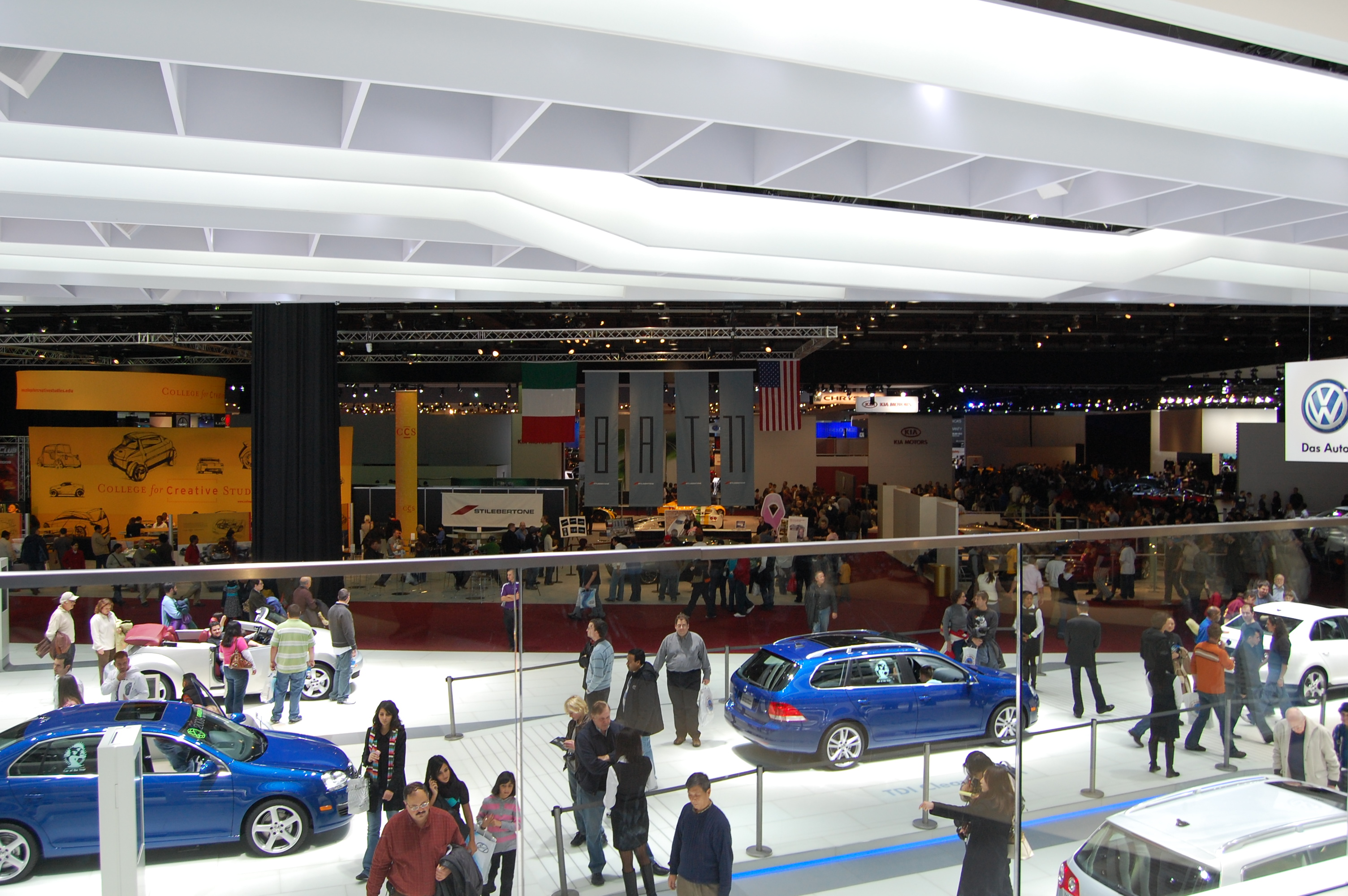 vue d'ensemble du NAIAS 2009